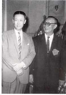 彰化商業銀行於民國35 ( 1946 ) 年10月16日成立改組籌備處。是日董事長張聘三( 右) 與年輕實業家辜振甫合照。